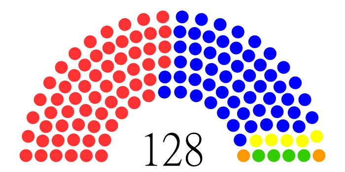 宏都拉斯國民黨 (55) 民主統一黨 (5) 宏都拉斯基督教民主黨 (4) 創新團結黨（2）